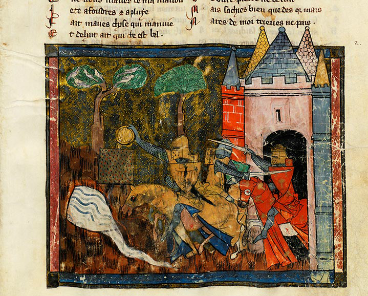 Enluminure d'un manuscrit du roman "Yvain ou le chevalier au lion" de Chrétien de Troyes. Manuscrit BN MS fr.1433. Cette enluminure orne le folio 65. Calogrenant, à cheval, en armure dorée, au centre, est représenté deux fois dans deux moments successifs de l'histoire. Tourné vers la gauche, il verse de l'eau sur le perron de la fontaine merveilleuse, ce qui déclenchera une tempête et fera venir le chevalier qui garde la fontaine afin que Calogrenant le défie au combat. Calogrenant est montré à côté tourné vers la droite : il se retourne pour faire face à Esclados le Roux, le chevalier gardien de la fontaine, qui sort de son château, prévenu par la tempête. Image d'un manuscrit du domaine public numérisée par la Bibliothèque nationale de France et trouvée sur le site de l'exposition virtuelle "Arthur, de l'Histoire à la littérature", du 20 octobre 2009 au 24 janvier 2010. (Direction éditoriale du site : Françoise Juhel, direction scientifique : Thierry Delcourt et Sarah Toulouse.)